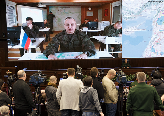 Начальник Координационного центра по примирению враждующих сторон на территории Сирийской Арабской Республики генерал-лейтенант Сергей Кураленко докладывает о выполнении перемирия в Сирийской Арабской Республике